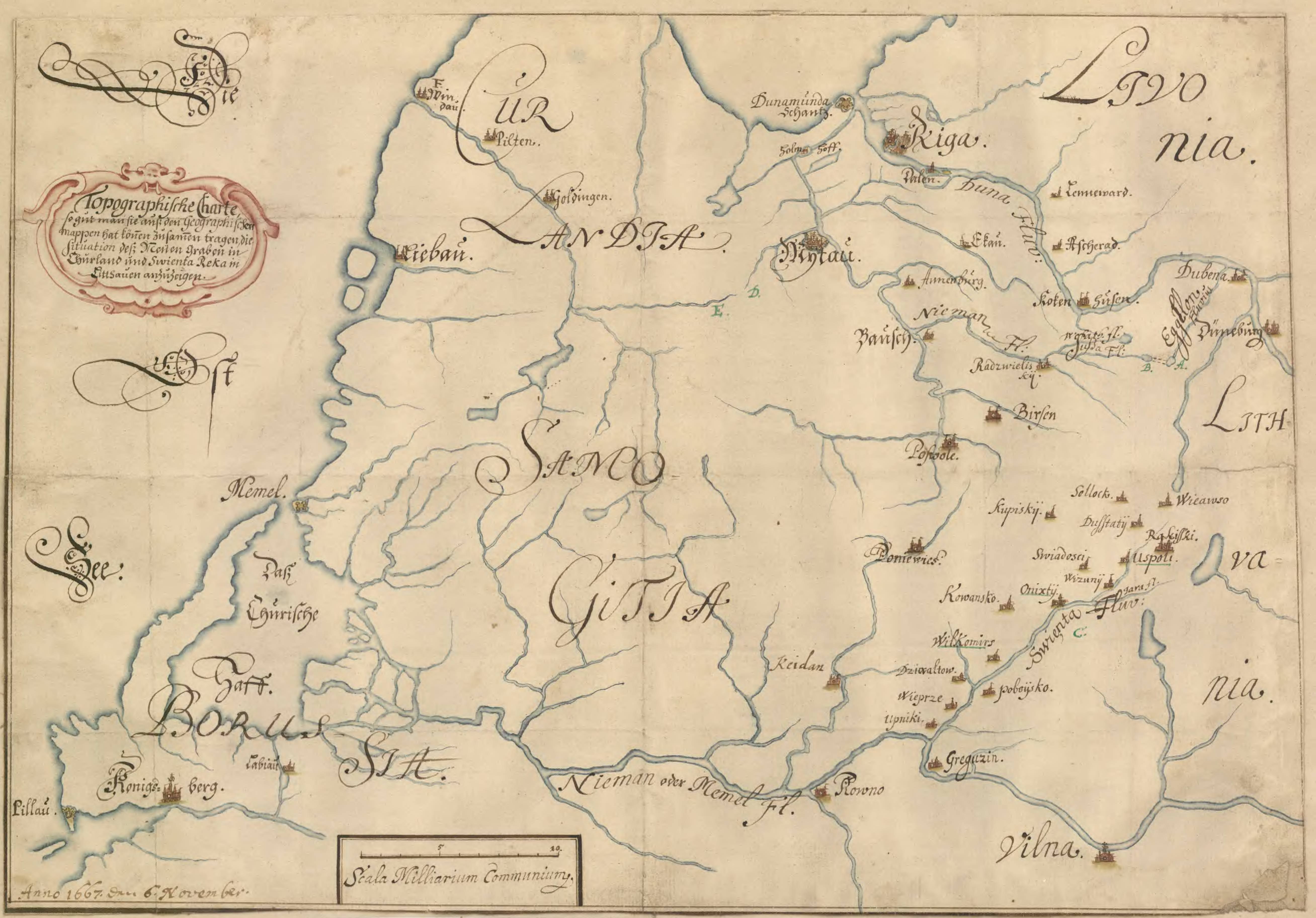 Беларуская (тарашкевіца): Курляндыя (Kurlandyja) і Жамойць (Žamojć). Мапа